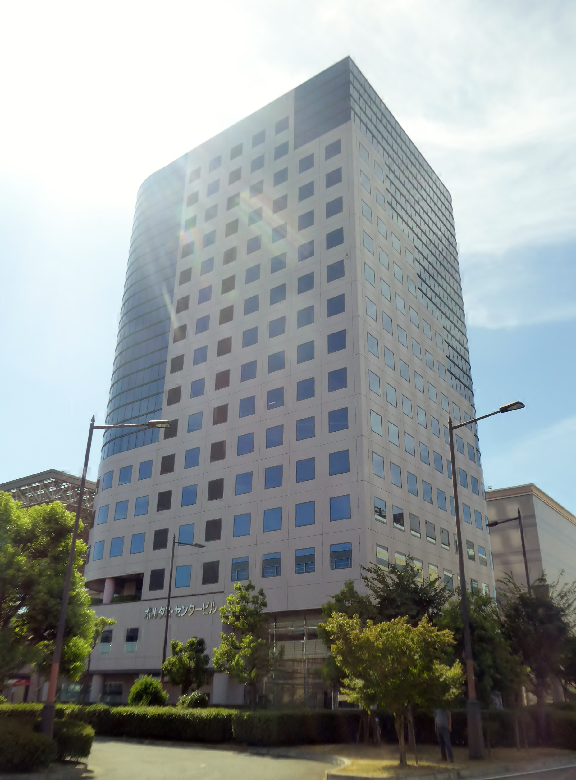 ポルタス・センタービルを撮影。 Panasonic Lumix DMC-TZ60